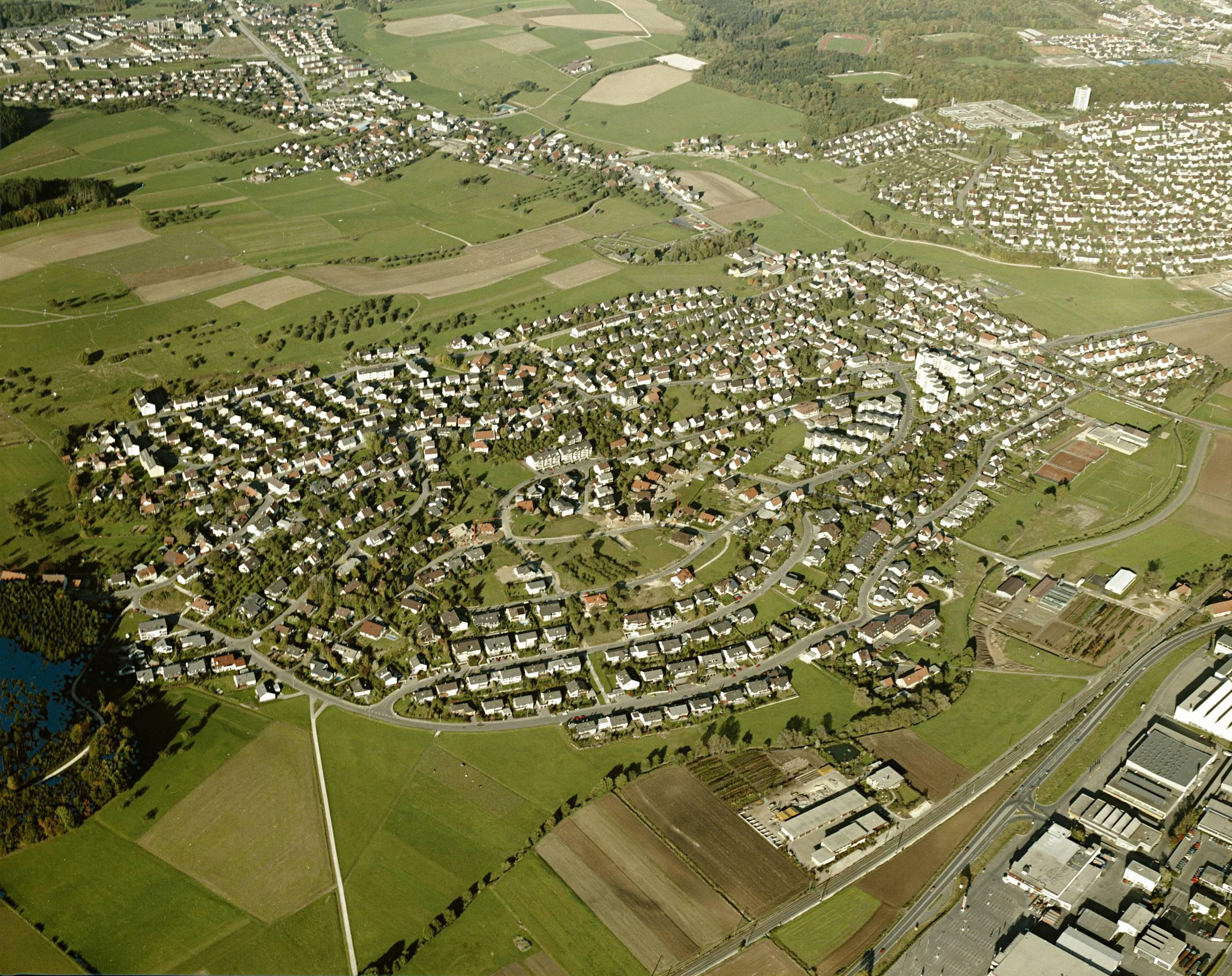 Luftbild von Hofherrnweiler - Staatsarchiv Sigmaringen - Archivalieneinheit N 1/96 T 1 Nr. 592